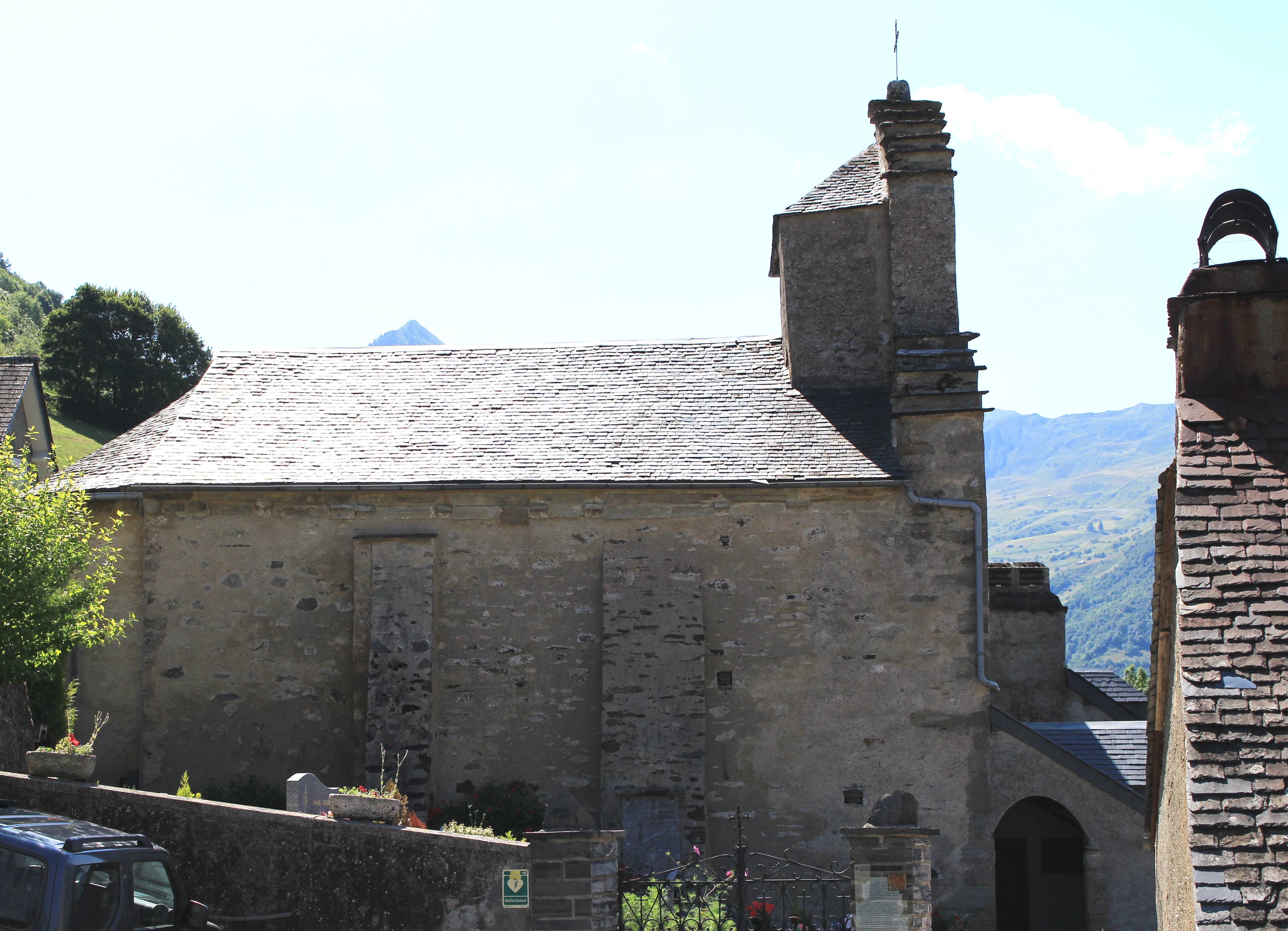 Église Saint-Michel de Vizos (Hautes-Pyrénées)